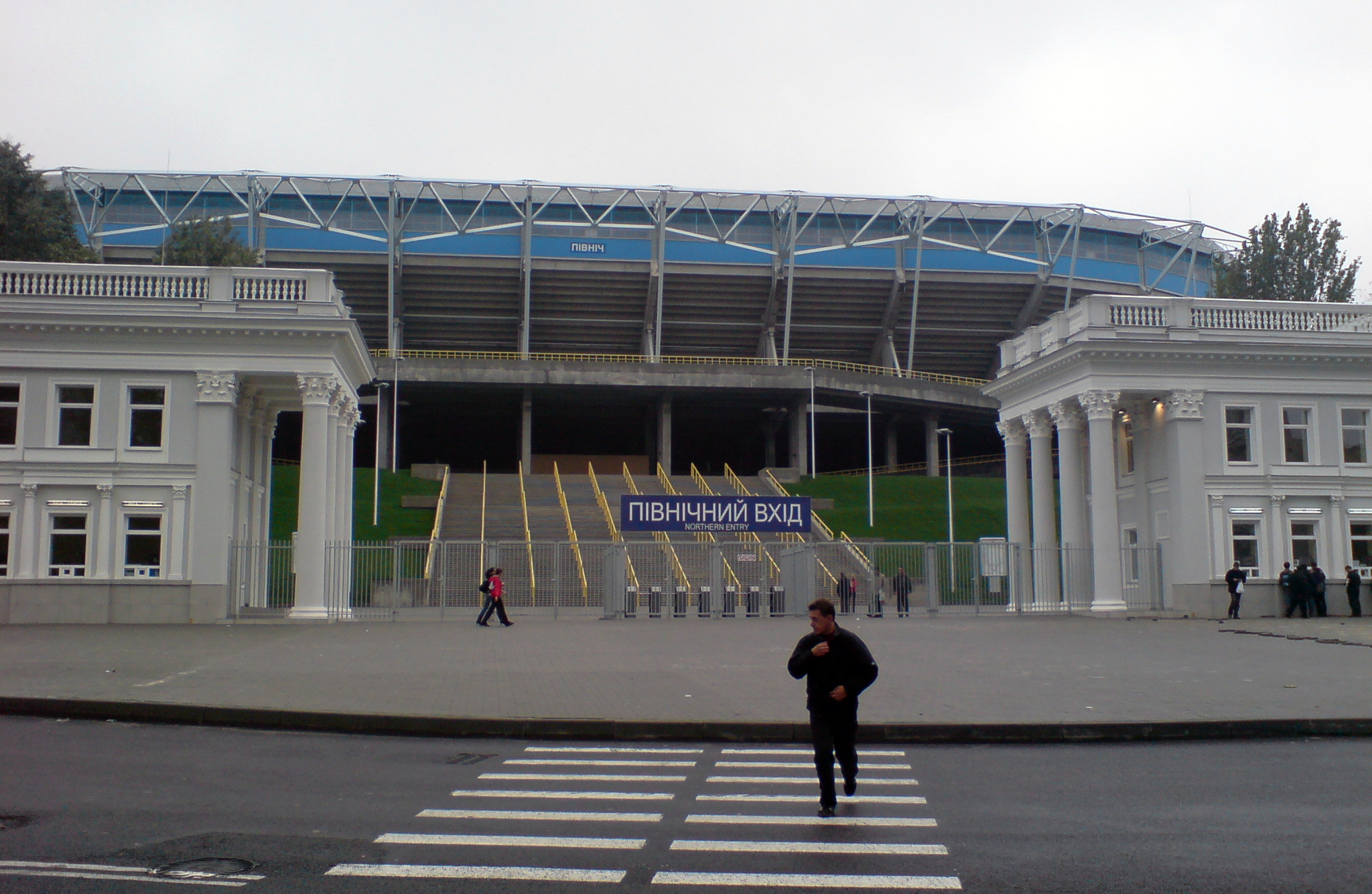 Стадіон «Дніпро Арена», вигляд з бульвару Кучеревського (Північний вхід)